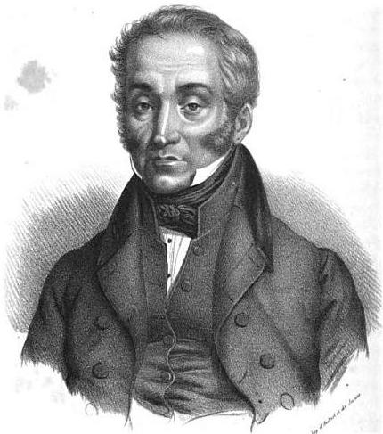 "Le prince Adam Czartoryski, président du gouvernement national de Pologne.